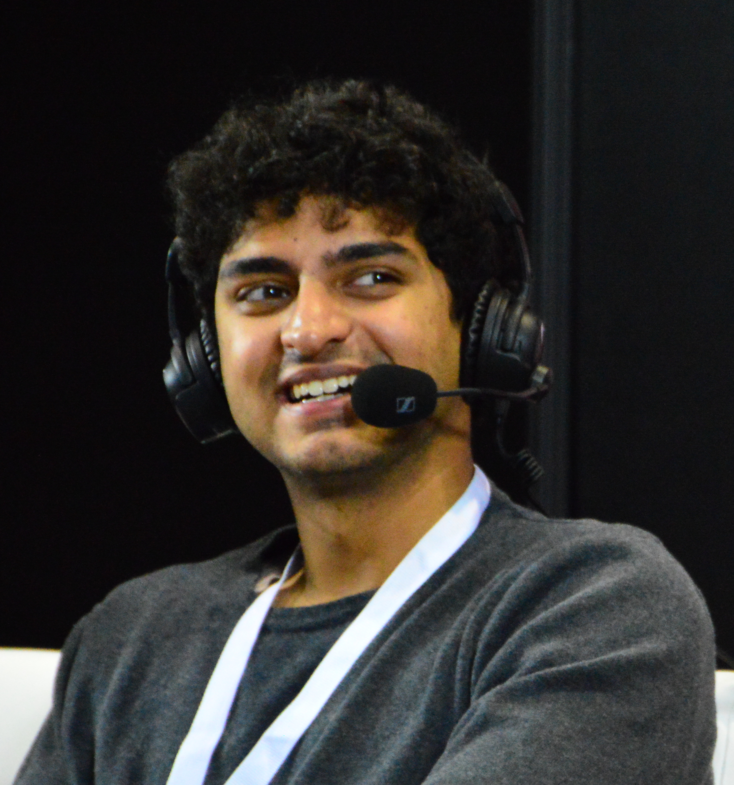 C2E2 2015